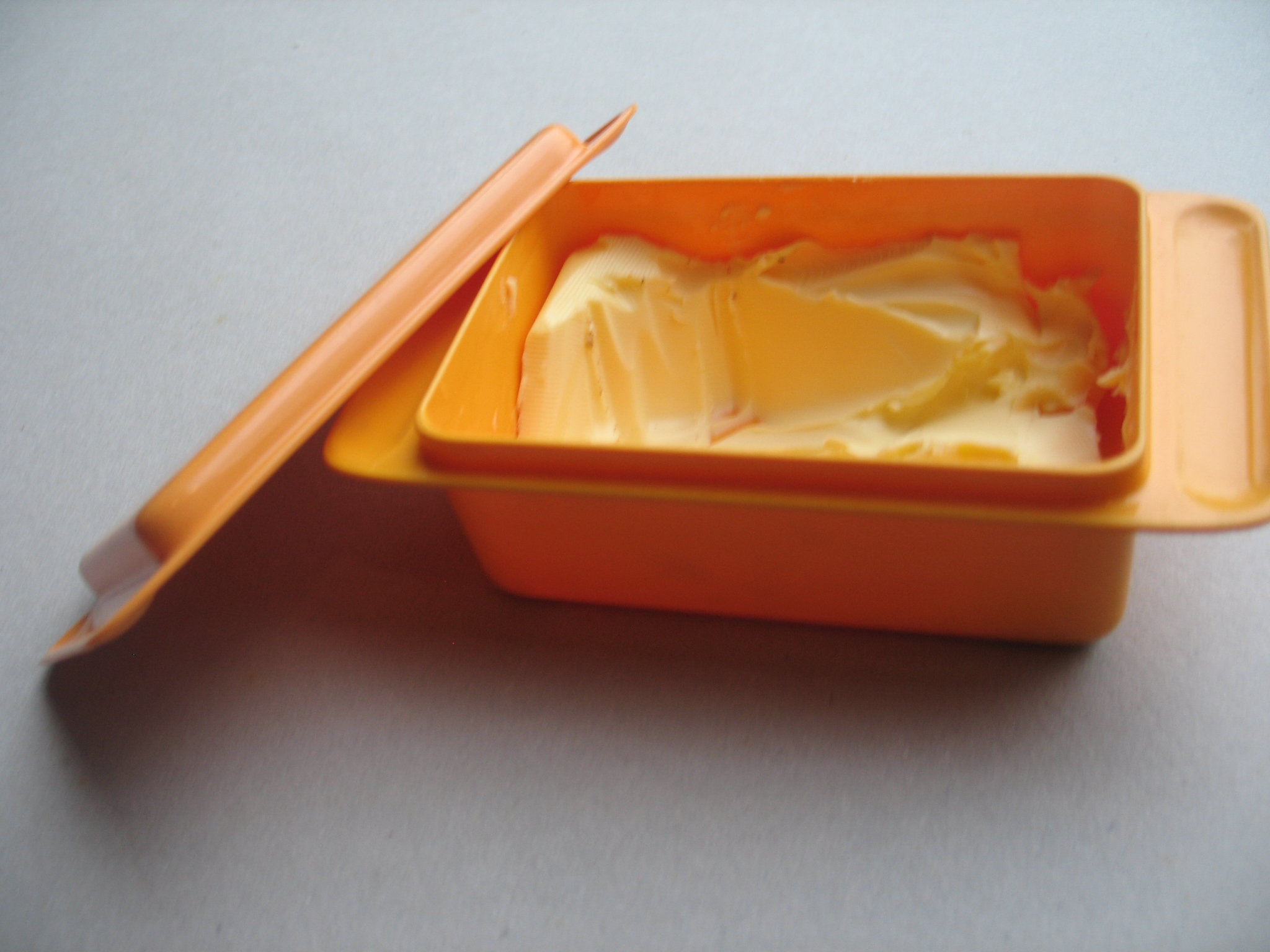 Botervloot